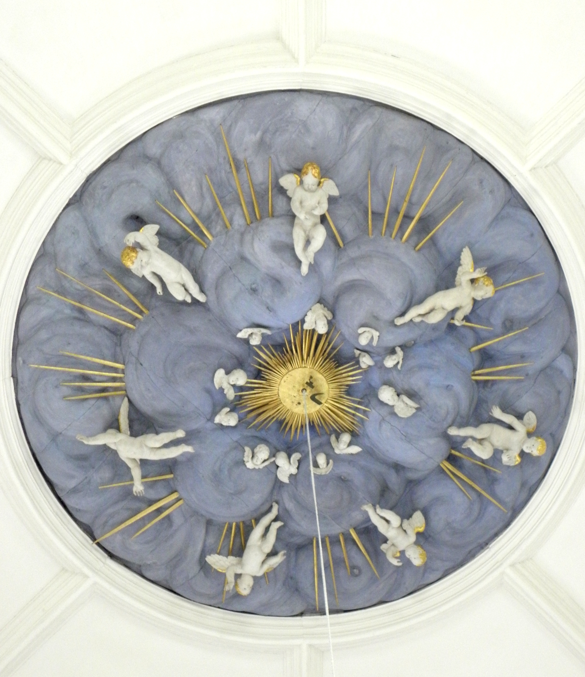 Carlsfeld, Trinitatiskirche, Innenansicht